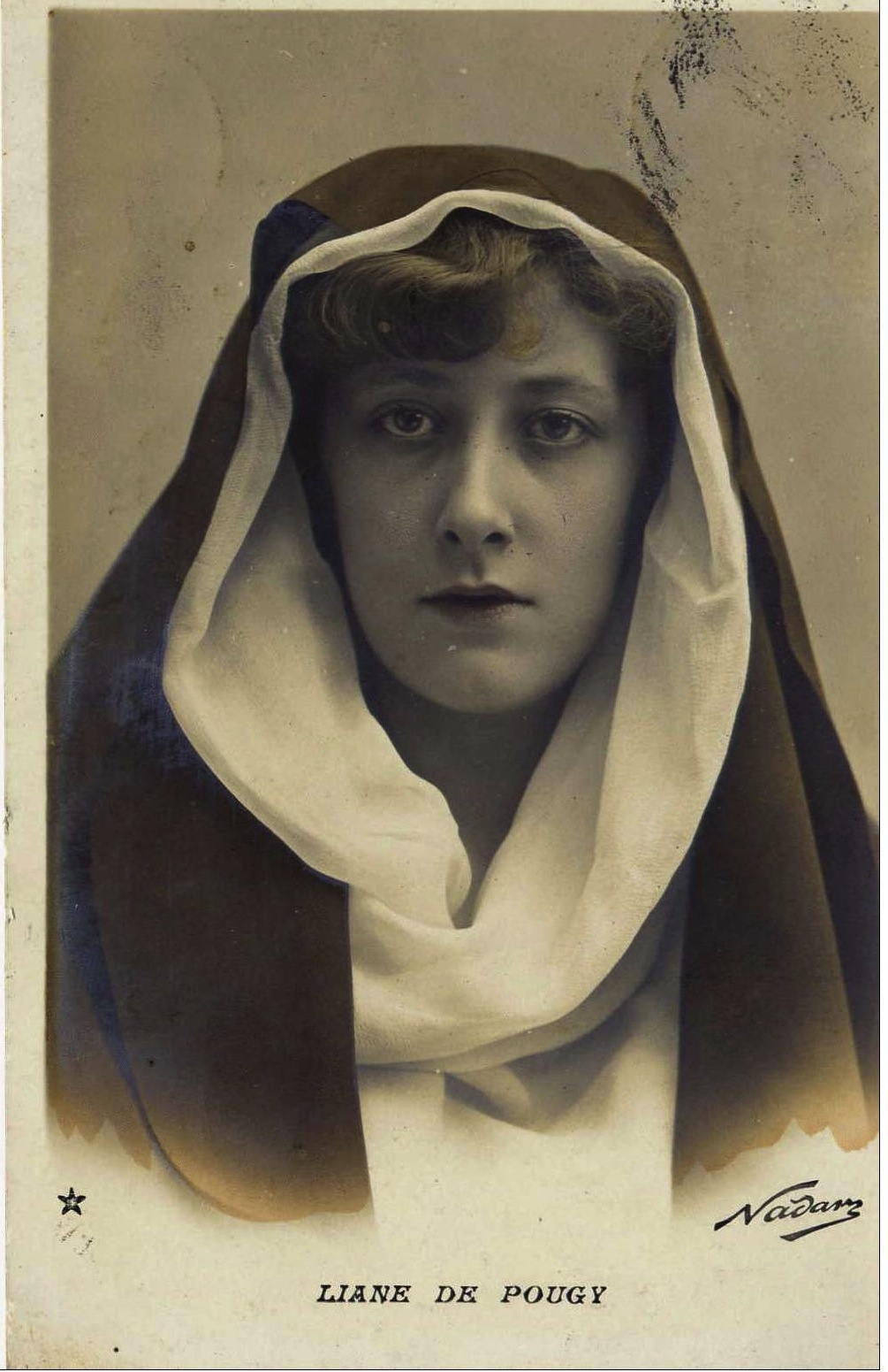 Liane de Pougy avec un voile de religieuse, par Nadar